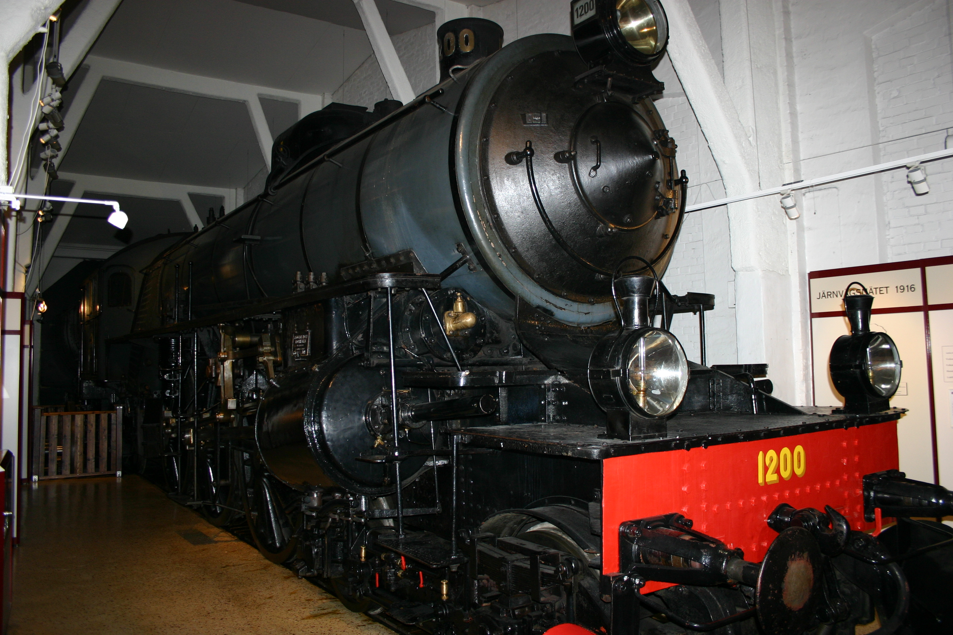 Dampflokomotive F 1200 Gävle 03.08.07